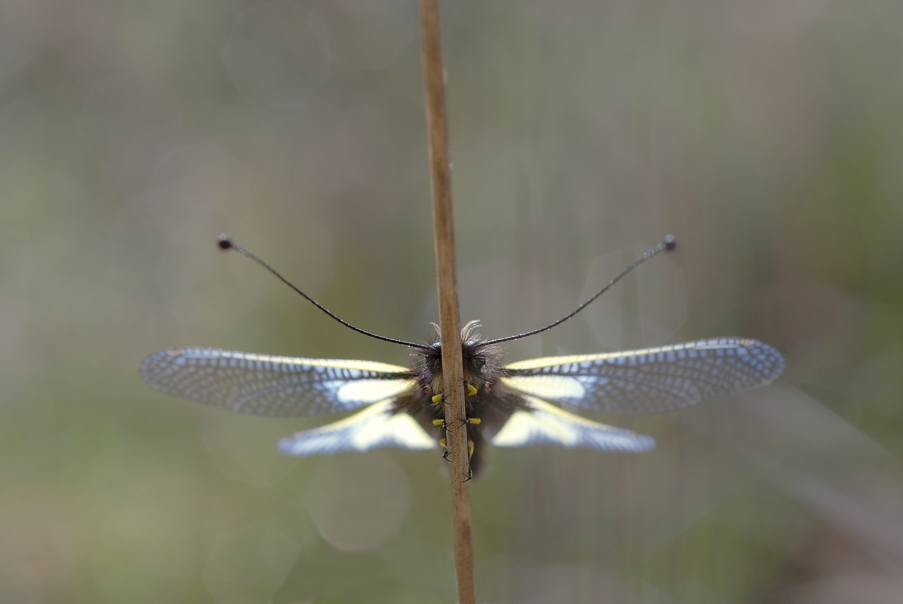 Libelloides coccajus